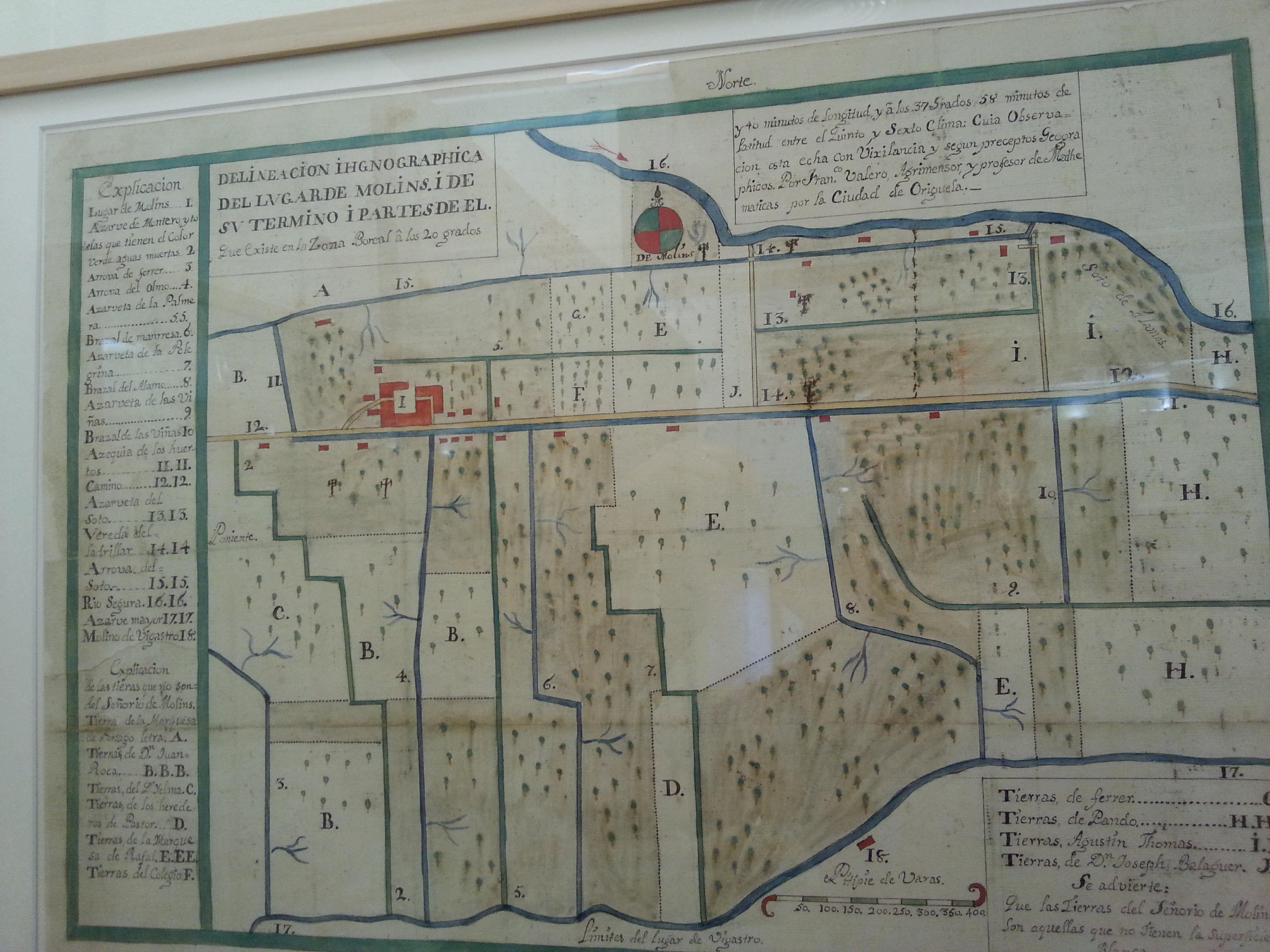 Mapa del lloc de Molins y el seu terme, dibuixat per l'agrimensor Francesc Valero (1775). ARV: Mapas i plànols, núm. 296. Arxiu del Regne de València.